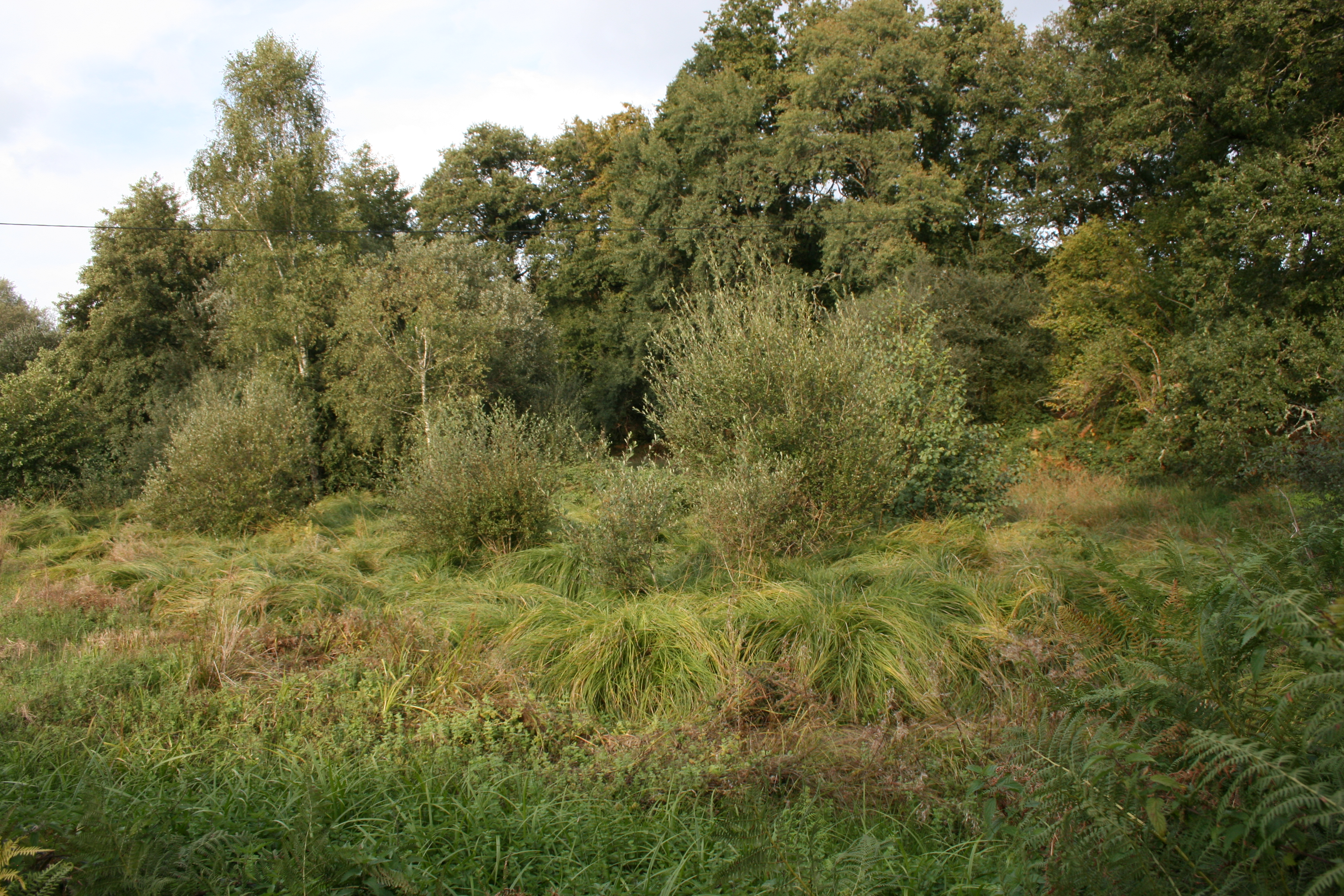 Superbe petite tourbière à sphaignes,dans un vallon, boisée d'aulnes et de bouleaux.Nombreux Carex bien implantés. Présence d'une petite péliade.